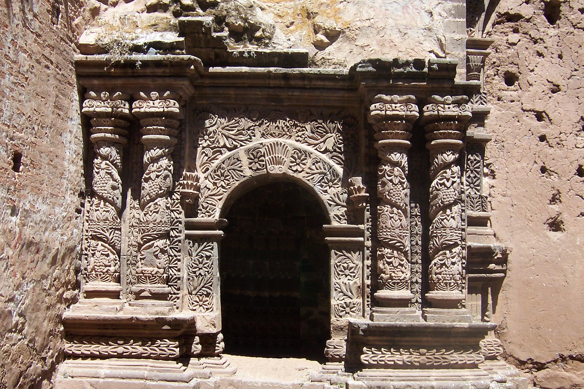 Juli. Santa Cruz Autor: Alfredobi Fecha: Agosto 2006